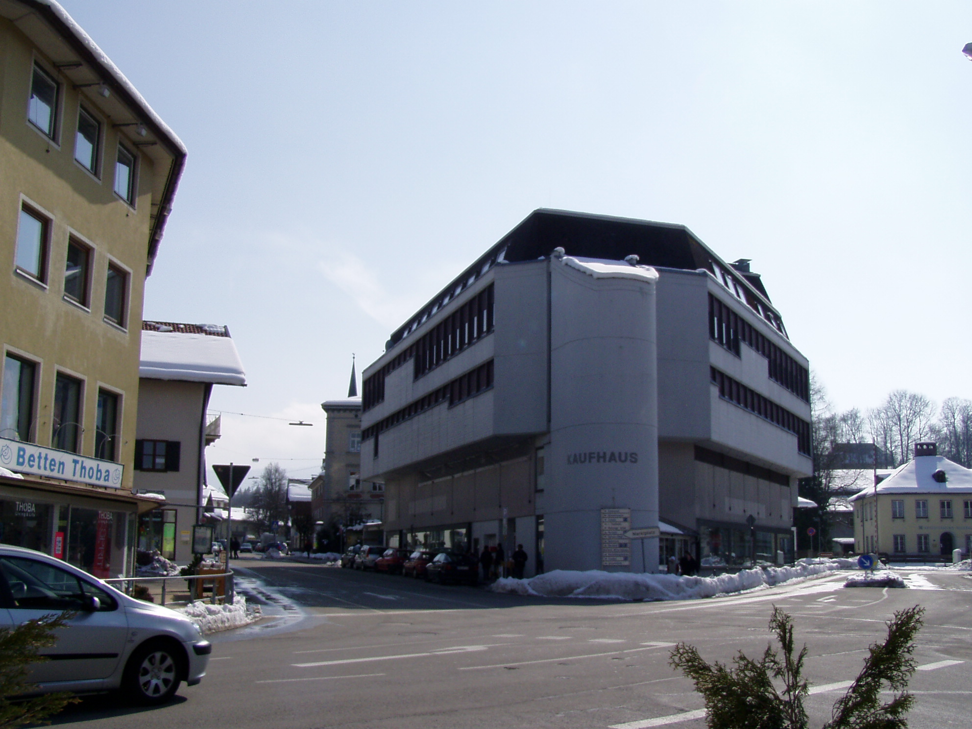 Miesbach - Bahnhofsplatz mit Kaufhaus im Jahre 2004